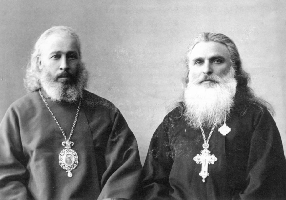 Сщмч. Кирион (Садзаглишвили) и св. Амвросий (Хелаиа). Фото. Грузия. 1910 год. Государственный музей искусств Грузии им. Ш. Амиранашвили. Тбилиси.